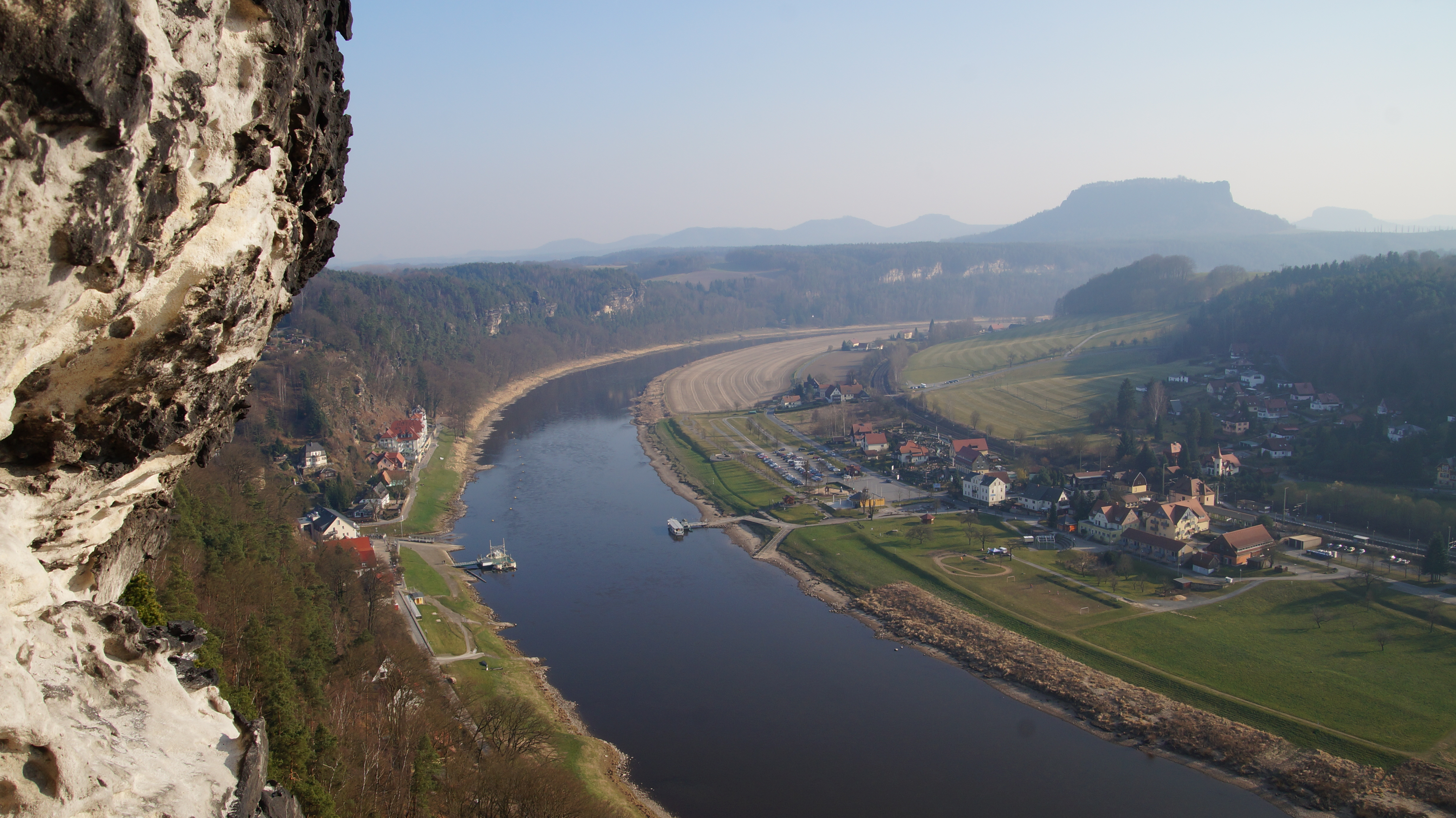 Nationalpark Sächsische Schweiz - Elbsandsteingebirge - Bastei Blick vom Basteiaufstieg über die Elbe - mit Elfähre Rathen - zum Lilienstein